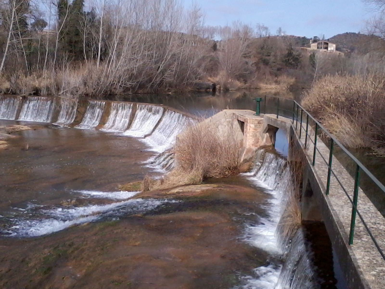 Resclosa a la riera de Merlès situada sota el petit nucli de Santa Maria de Merlès